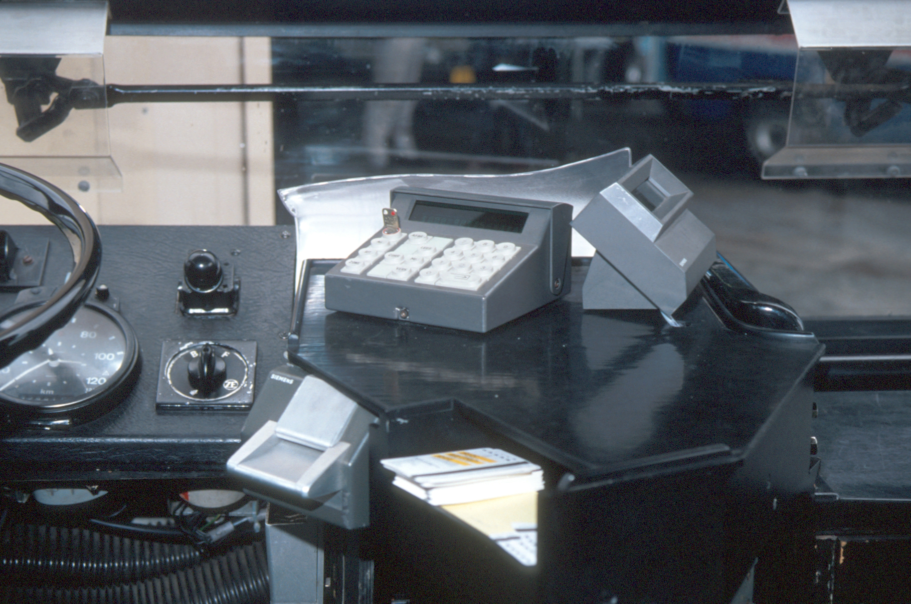 Proef opstelling magneetkaart apperatuur tijdens opendag bij GVB in Groningen. Tot een invoer van dit systeeem is het in Nederland niet gekomen.